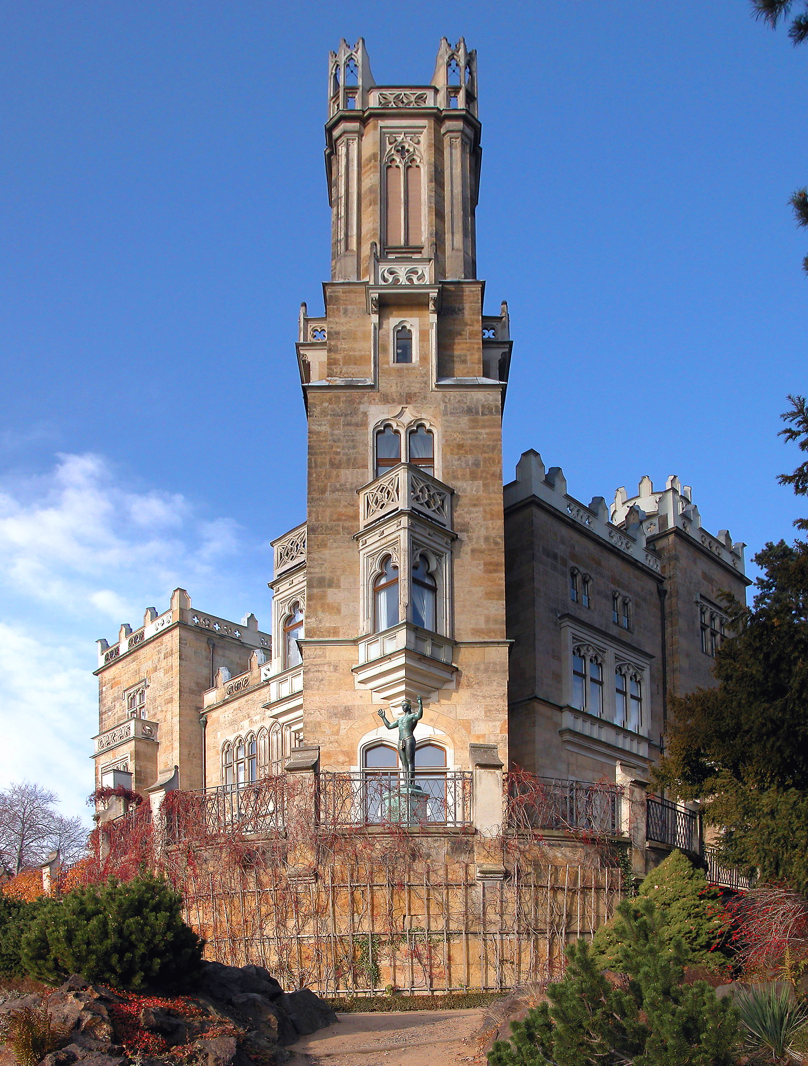 15.11.2003 01099 Dresden-Loschwitz, Bautzner Str. 134 (GMP: 51.063566,13.799471): Villa Souchay, Schloß Eckberg von SW. 1859-1861 von Christian Friedrich Arnold im Stil der Spätromantik / Tudorgotik. Heute Hotel. Sicht von Südosten. [DSCN]20031115640MDR.JPG(c)Blobelt